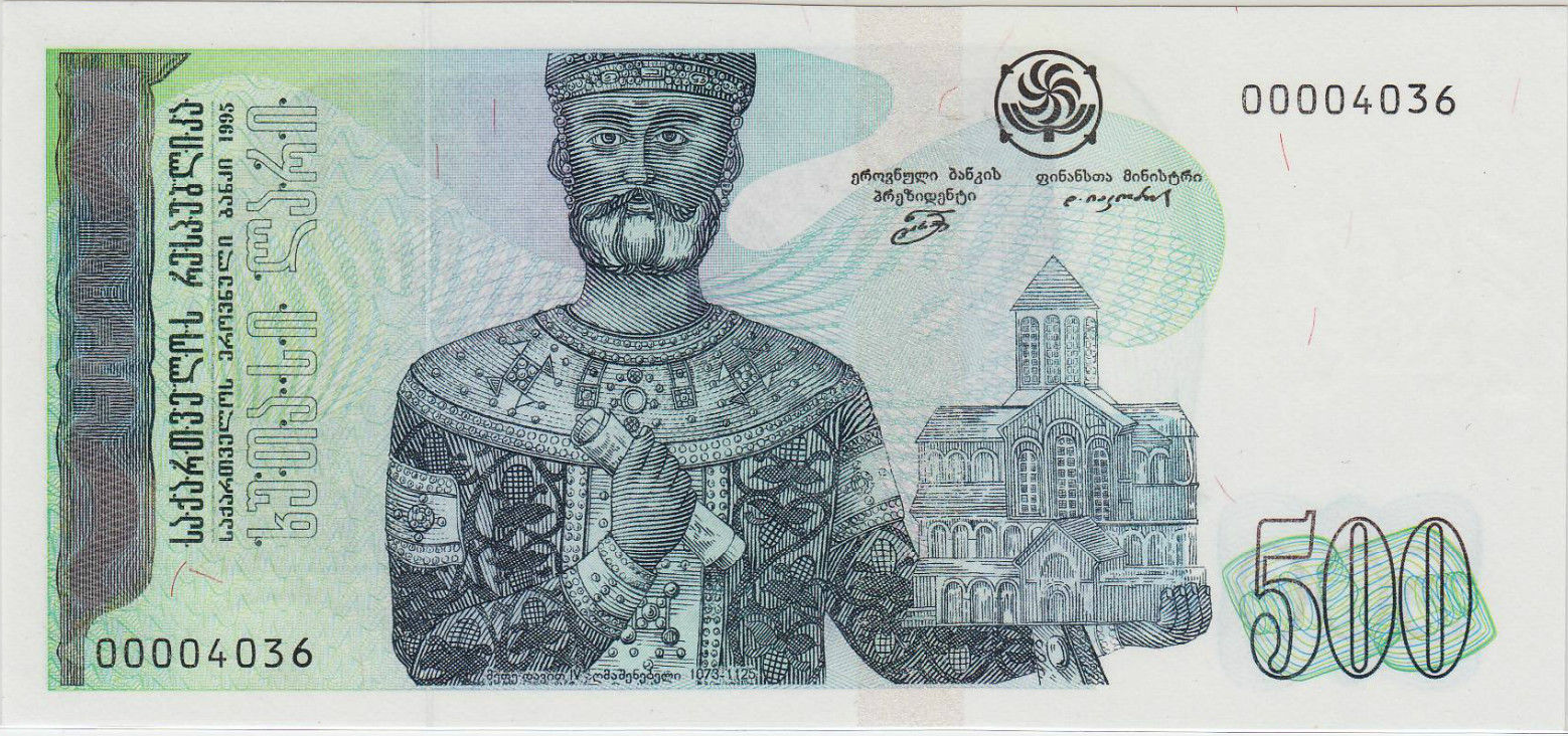 500 ლარიანი ბანკნოტი (წინა მხარე)